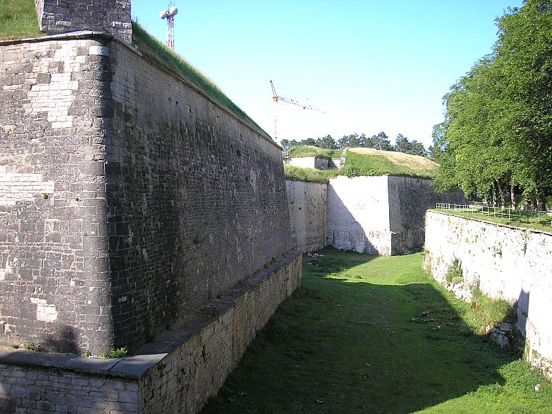 Festung Wülzburg über Weißenburg (Mittelfranken) / Fortress Wuelzburg near Weissenburg, Middle Franconia, Germany. Graben und Wallmauern / Moat and fortification walls. Eigene Aufnahme, Juli 2006 / Own Photo, July 2006